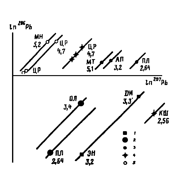 Зависимость изотопных отношений от плотности минерала. Установлены по положению квазиизохрон. Данные: 1 — Р. Е. Зартман и др., 1973; 2 — Р. К. Ванлесс и др., 1974; 3 — Е. И. Гамильтон, 1968; 4 — Дж. Н. Алейникофф и др., 1979; 5 — V. Schenk, 1980